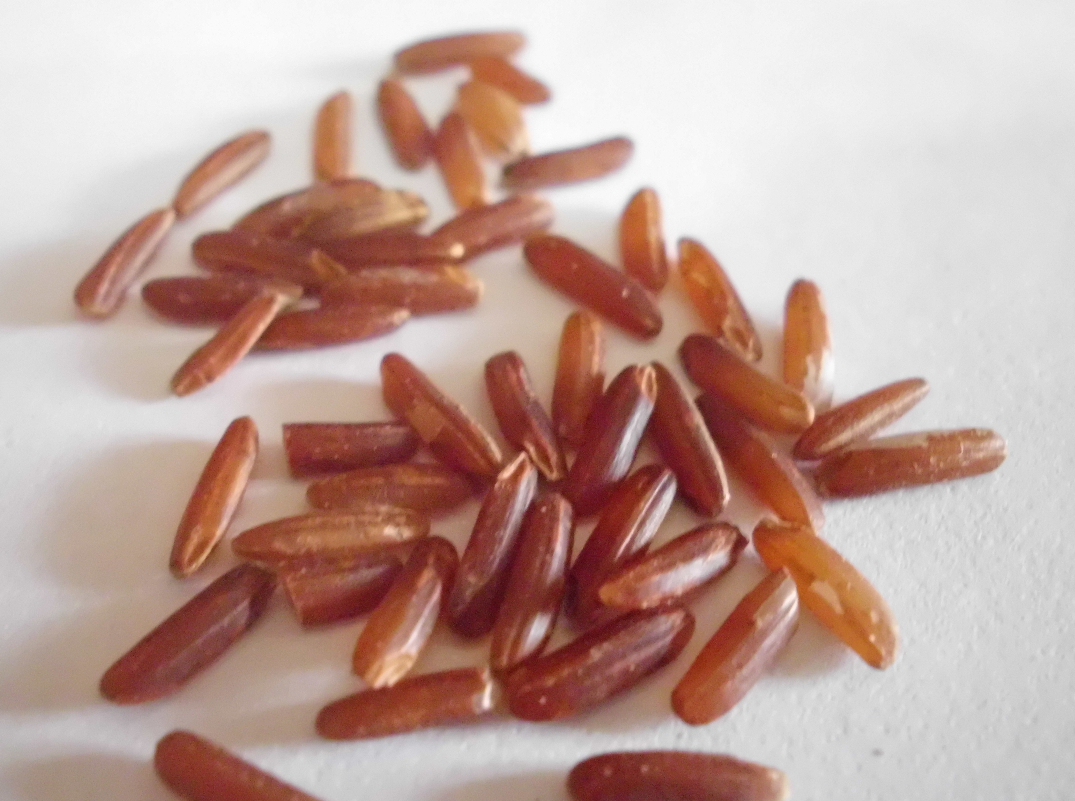 "Красный" рис